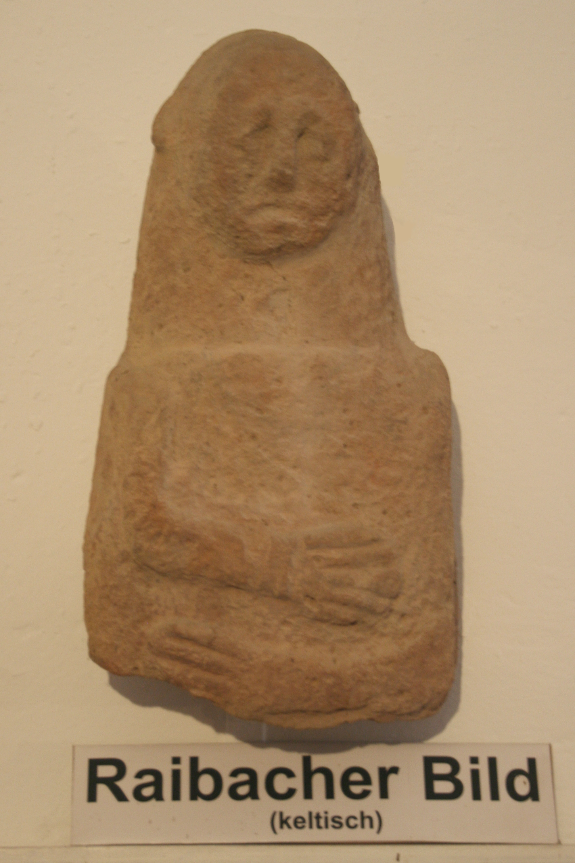 Raibacher Bild, vermutlich keltische Stele, gefunden bei Breuberg-Rai-Breitenbach. Kopie im Breubergmuseum.